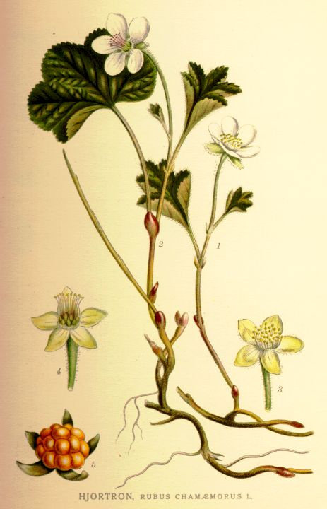 Rubus chamæmorus L.